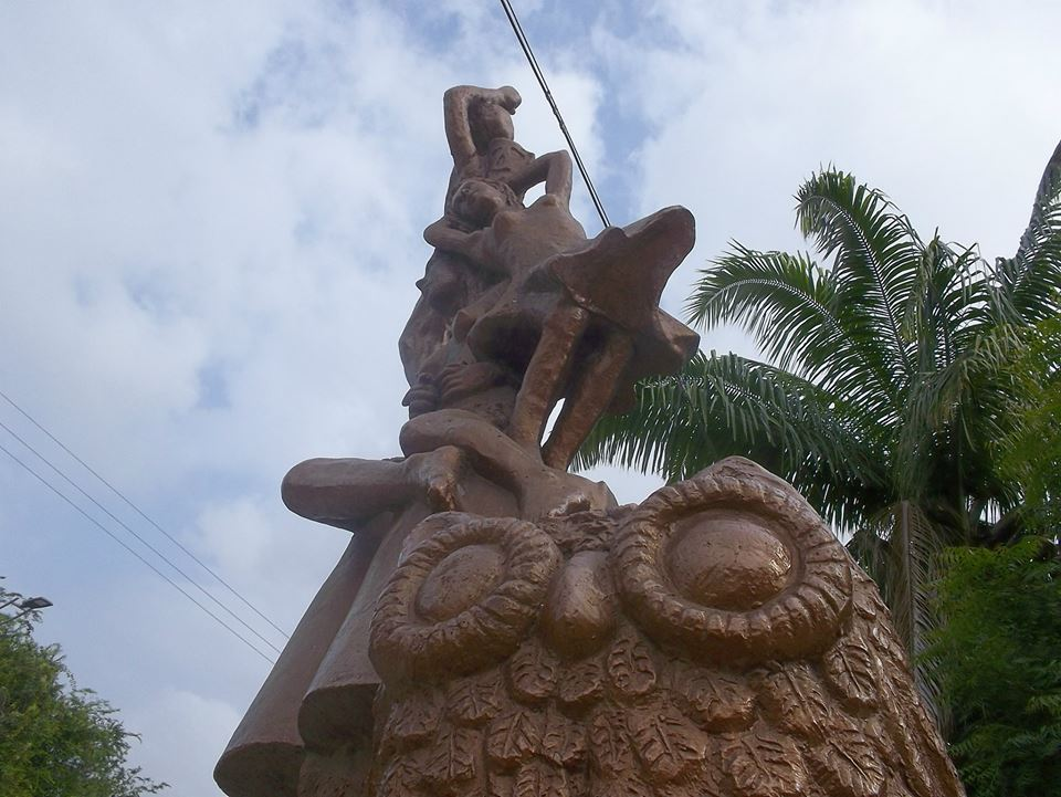 Esta estatua esta ubicada en el parque de la lotería, que queda ubicado a un costado de una de las troncales de el municipio que lleva a la capital de montería, esta estatua es muy conocida debido que representa la cultura y la alegría que aun vive de los esclavos.